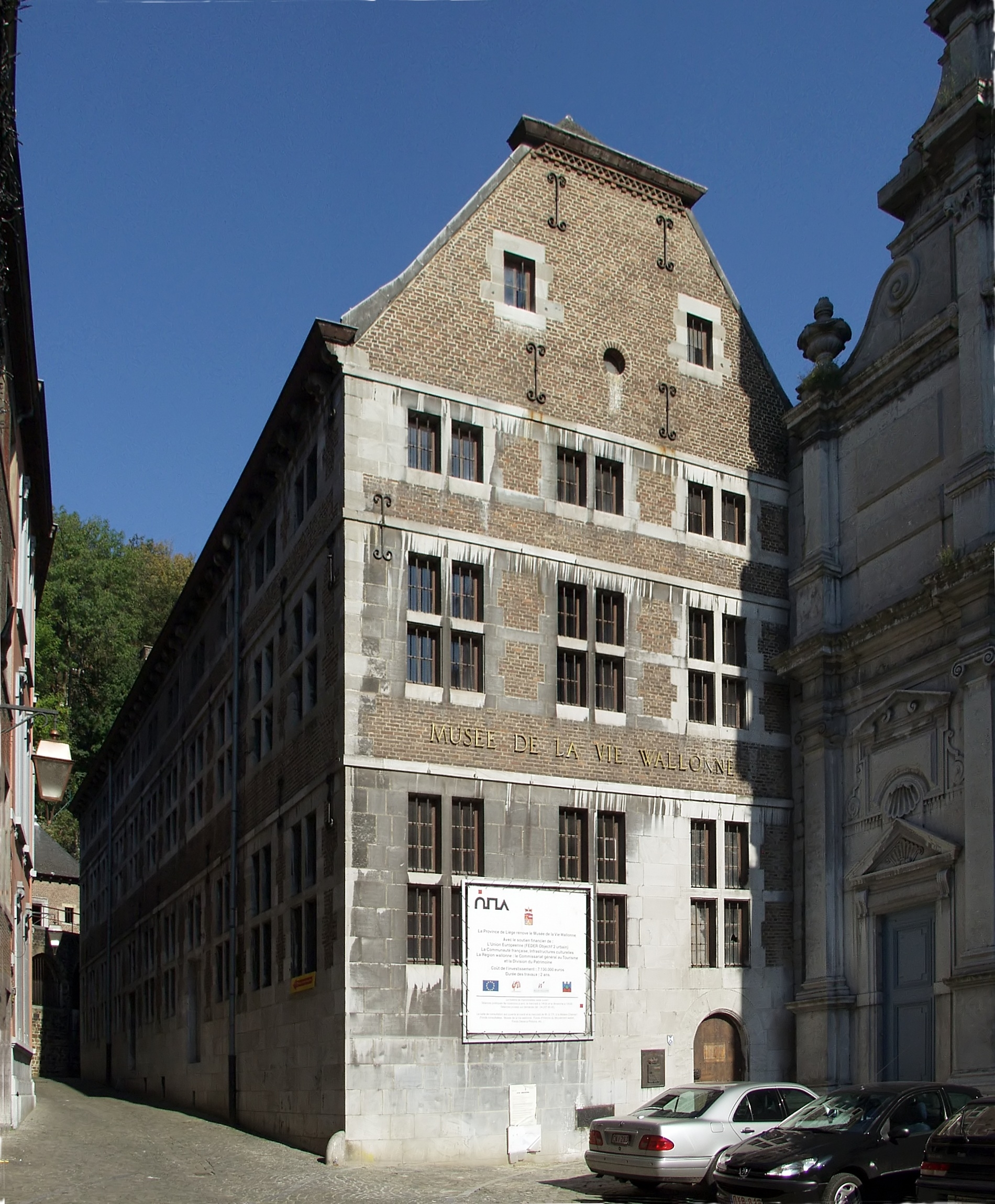 Musée de la vie wallonne, Liège, Belgium